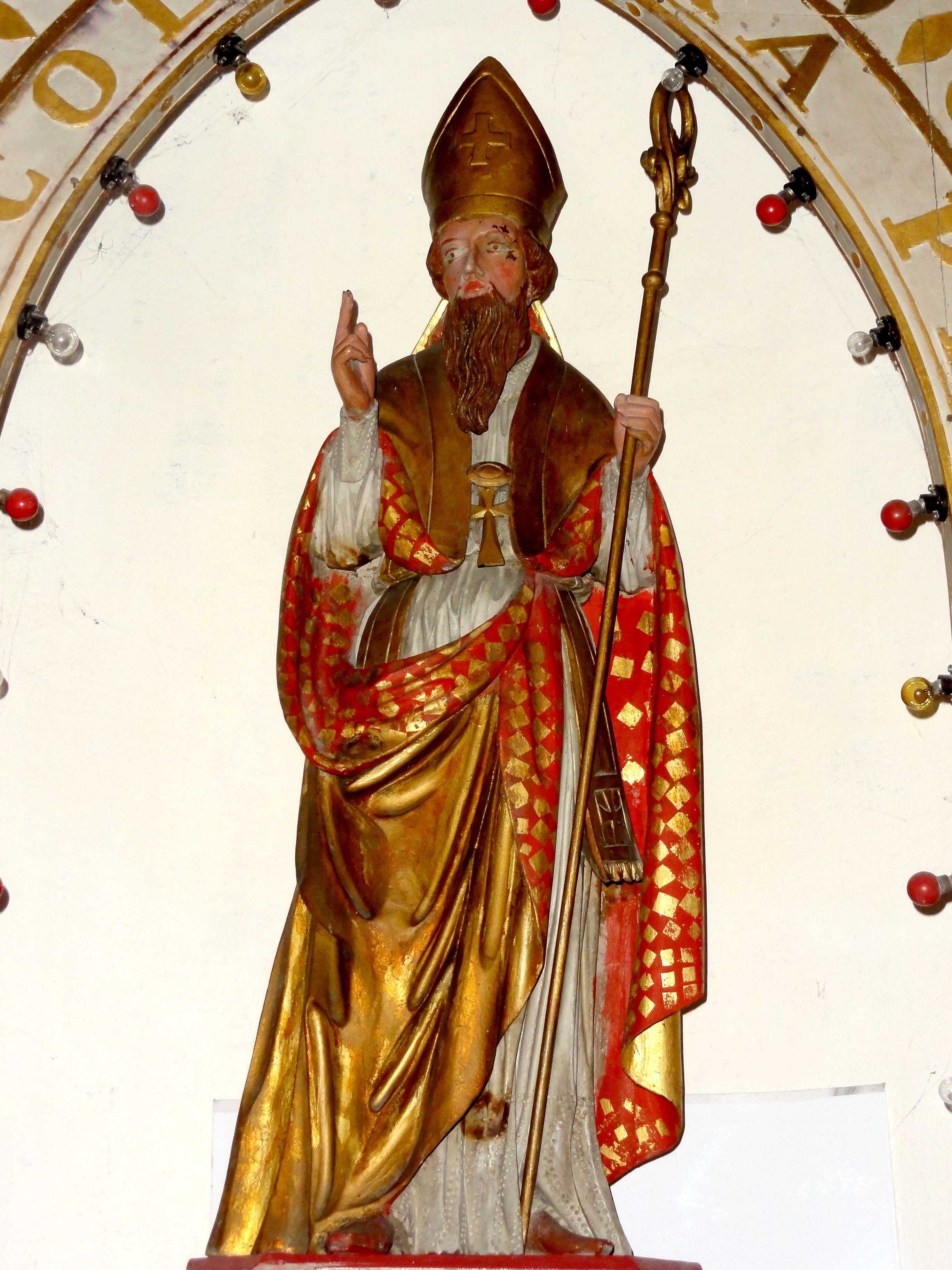 Mobilier de l'église (voir titre).